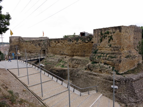 castell Formós a Balaguer - Noguera / Lleida - Catalunya